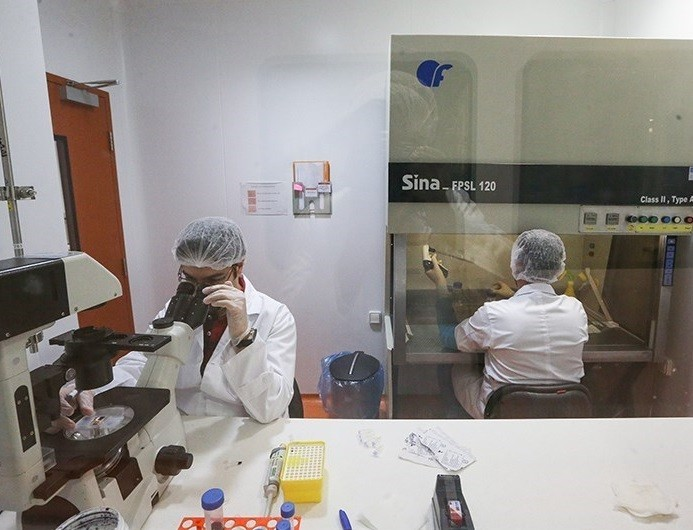 شرکت دانش بنیان آریوژن